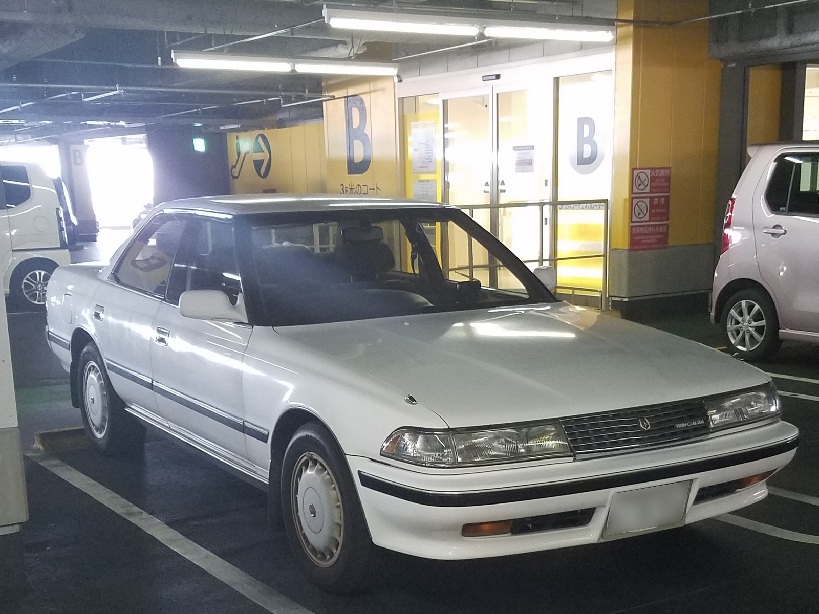 マークII グランデツインカム24（前期型）